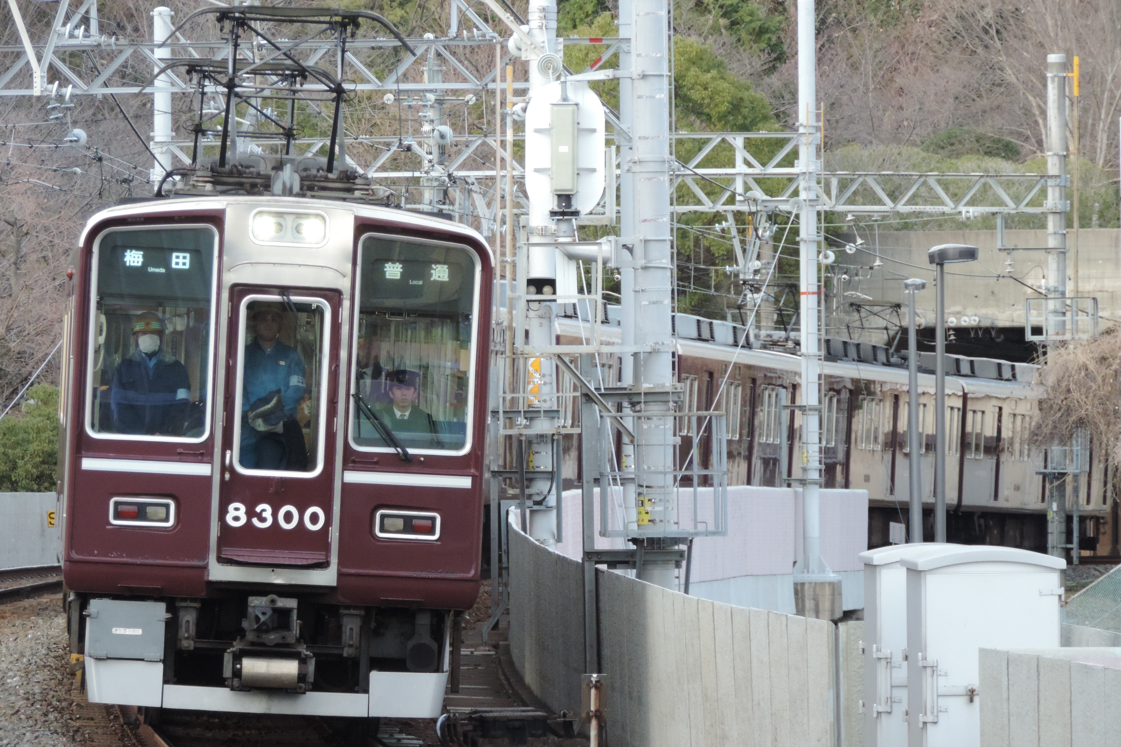 8300系30周年記念塗装